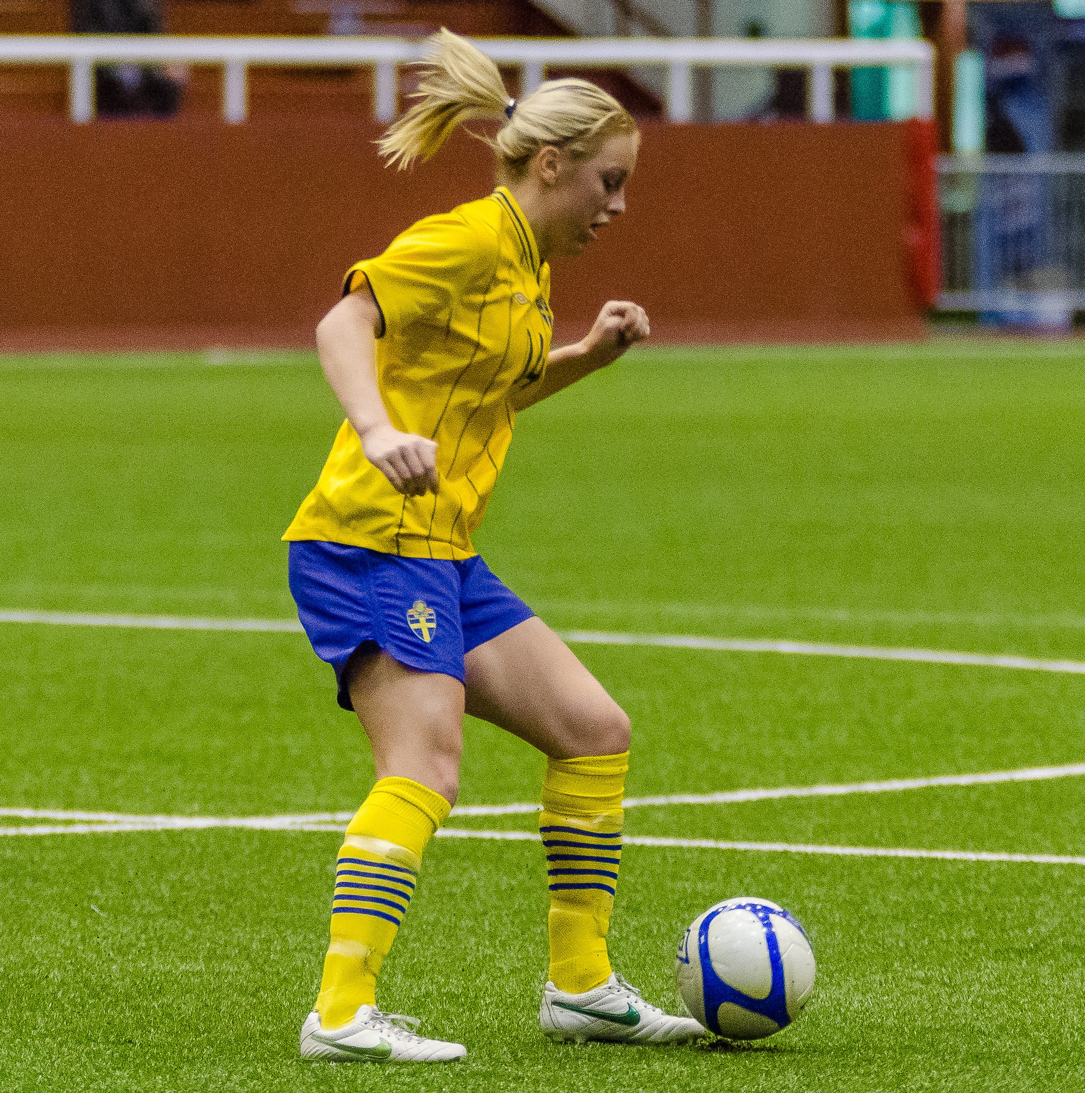 Mimmi Larsson spelar F18-landskamp mellan Sverige och Tyskland i Växjö Tipshall, 21/11 2012.